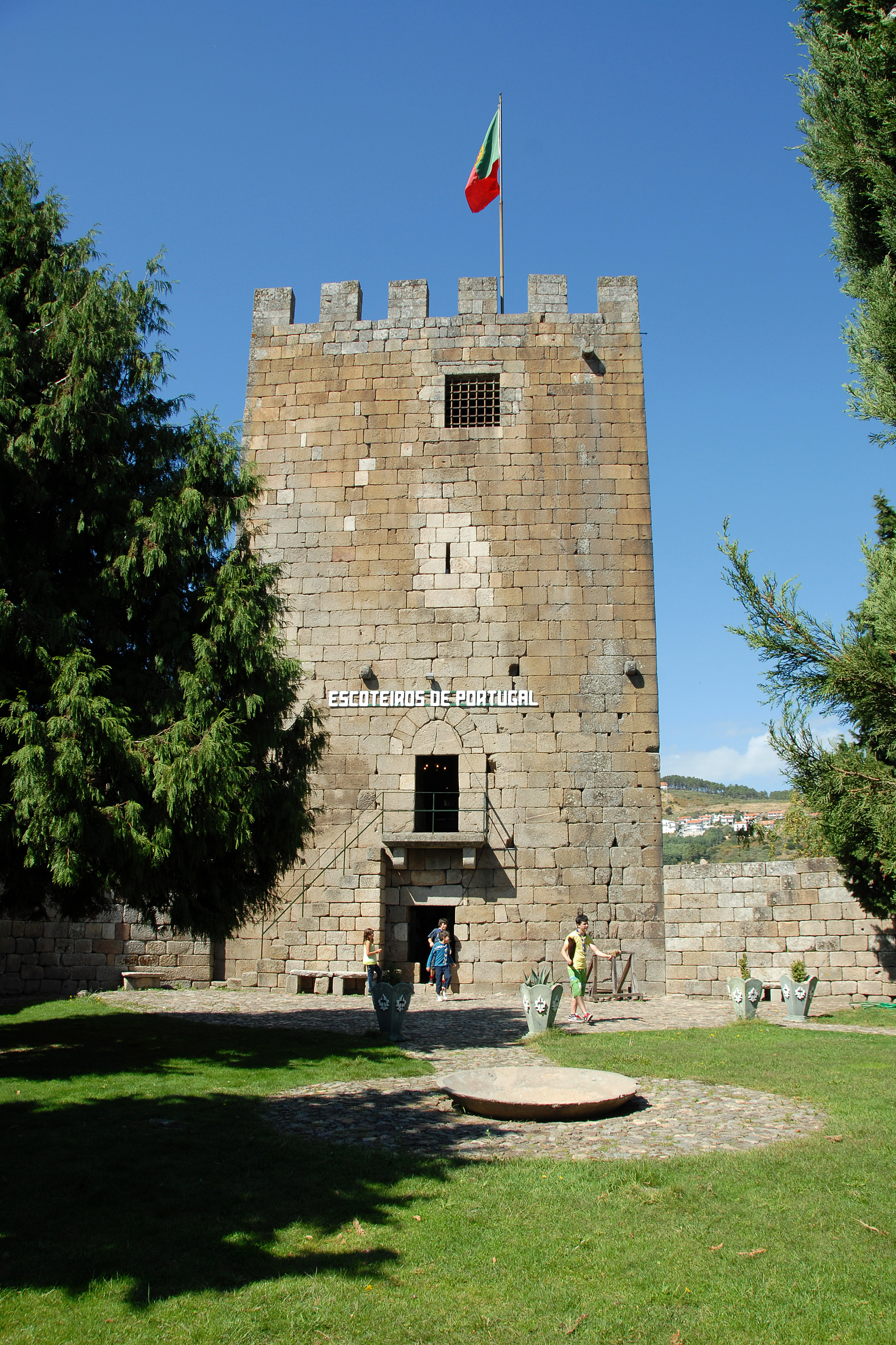 Lamego - Castelo de Lamego This file was uploaded for Wiki Loves Monuments in Portugal with the unique identifier 70699.